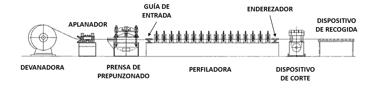 Los productos perfilados son fabricados en líneas de producción continuas, que incorporan diferentes operaciones complementarias al propio proceso de perfilado.